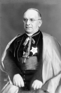 Католический епископ Хельсинки Йоханнес Букс